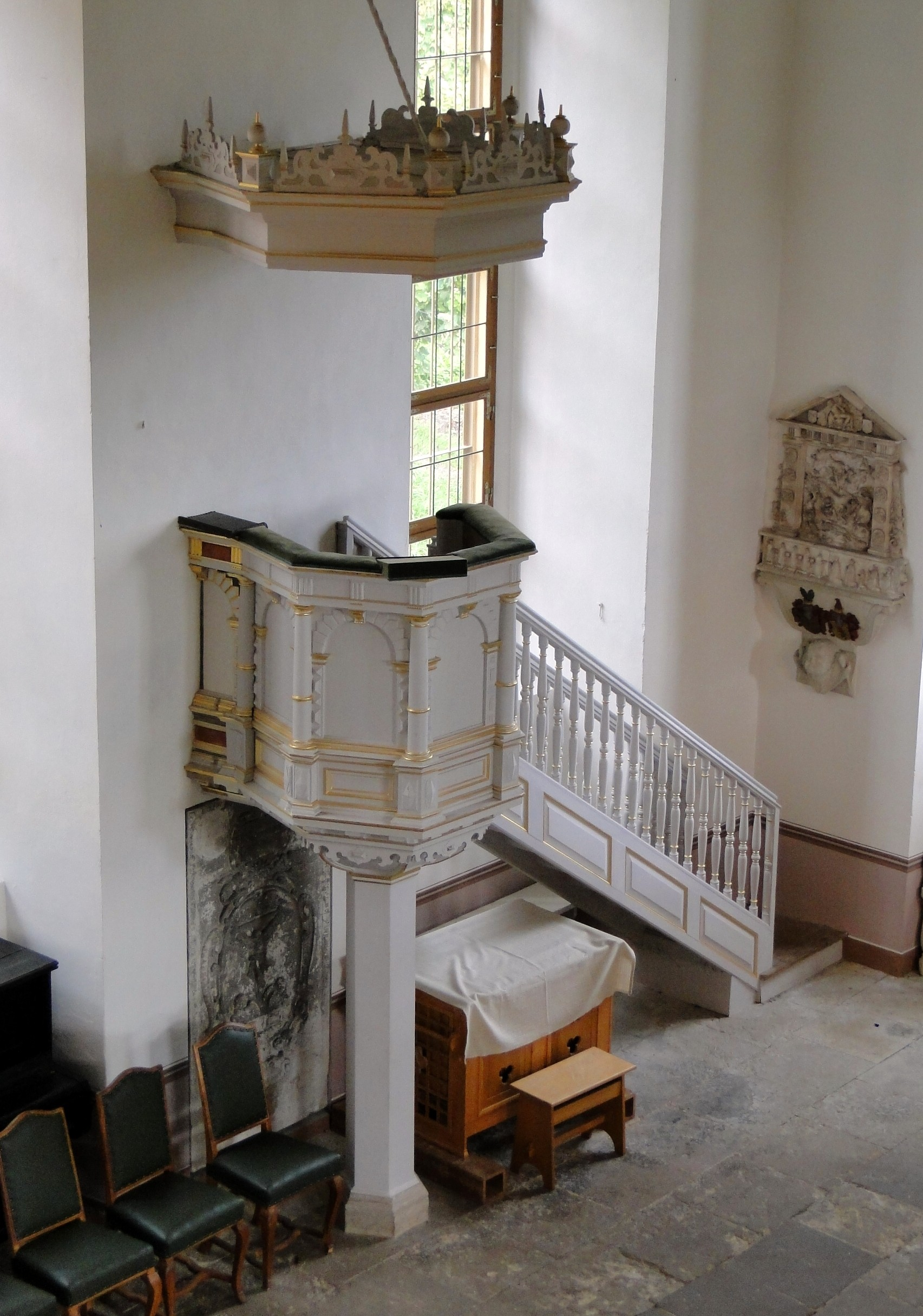 Die Weinbergkirche in Dresden-Pillnitz